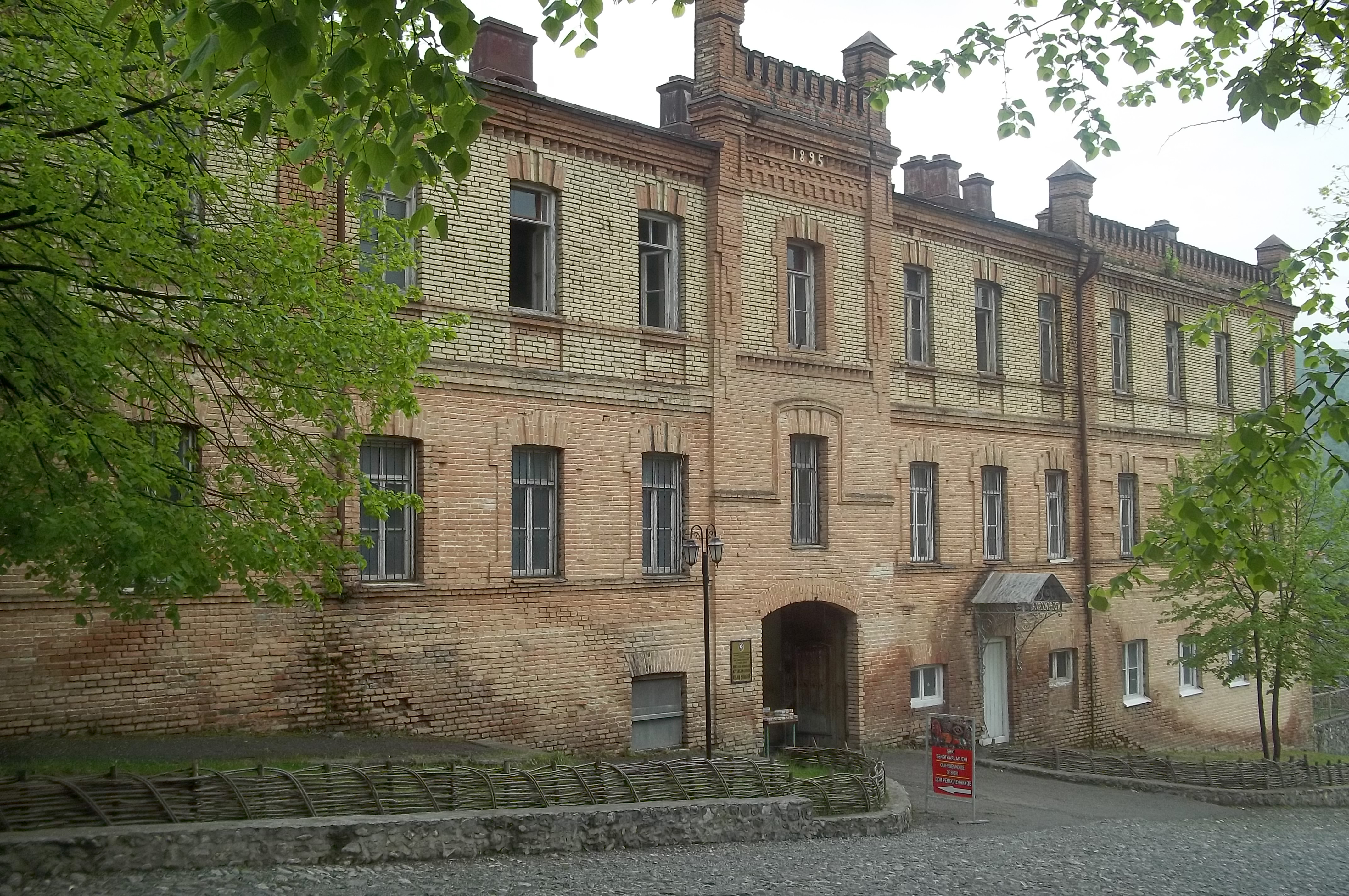 Nuxa qalasında 1895-ci ildə tikilmiş türmə binasının müasir görünüşü